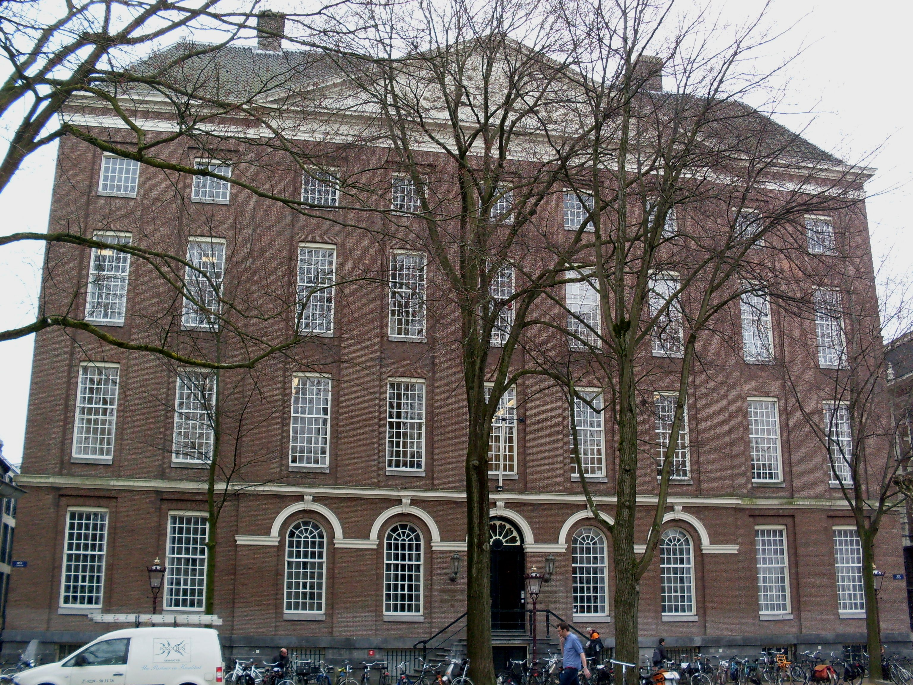 Spui 21